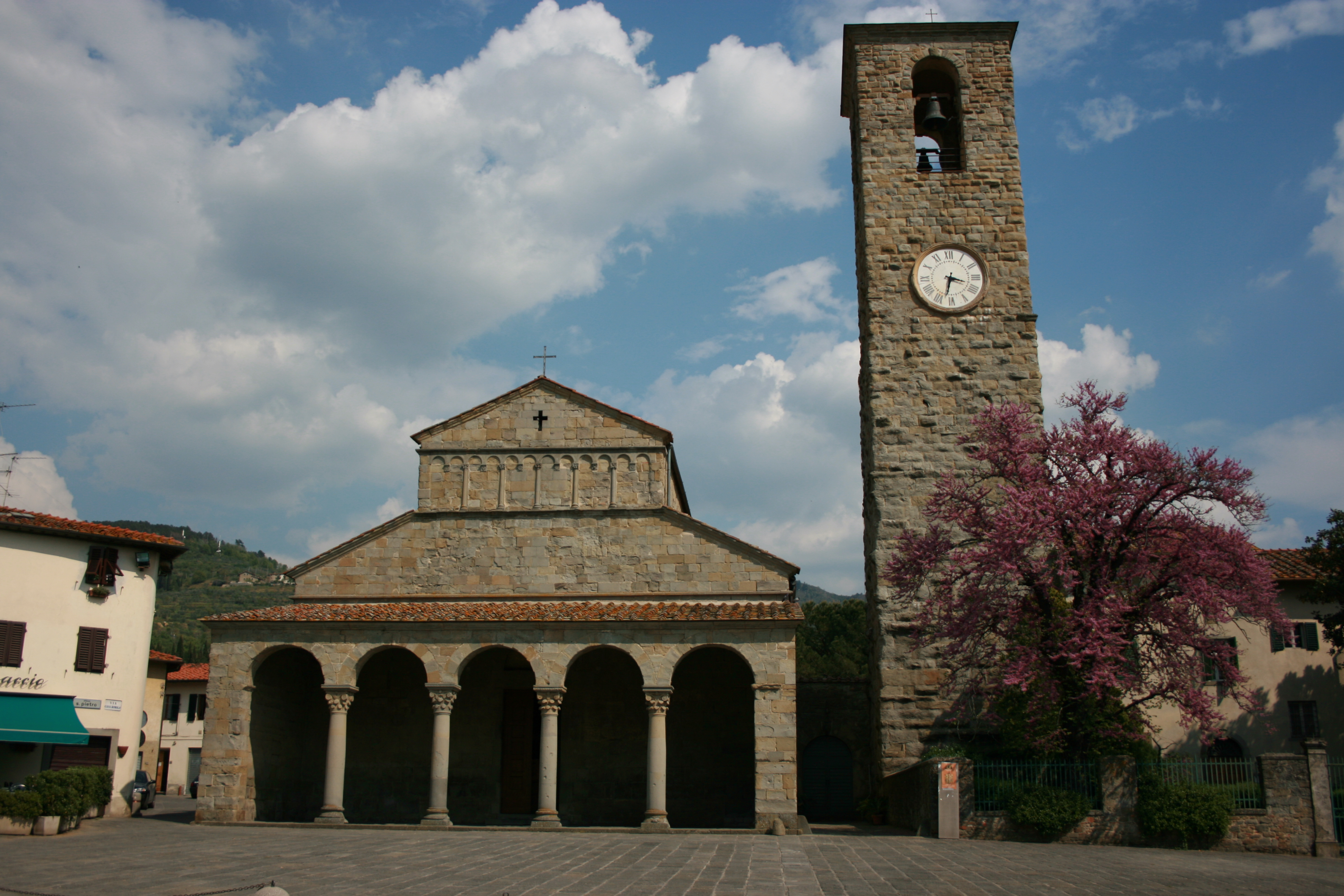 Church of San Pietro a Cascia, Reggello-Firenze